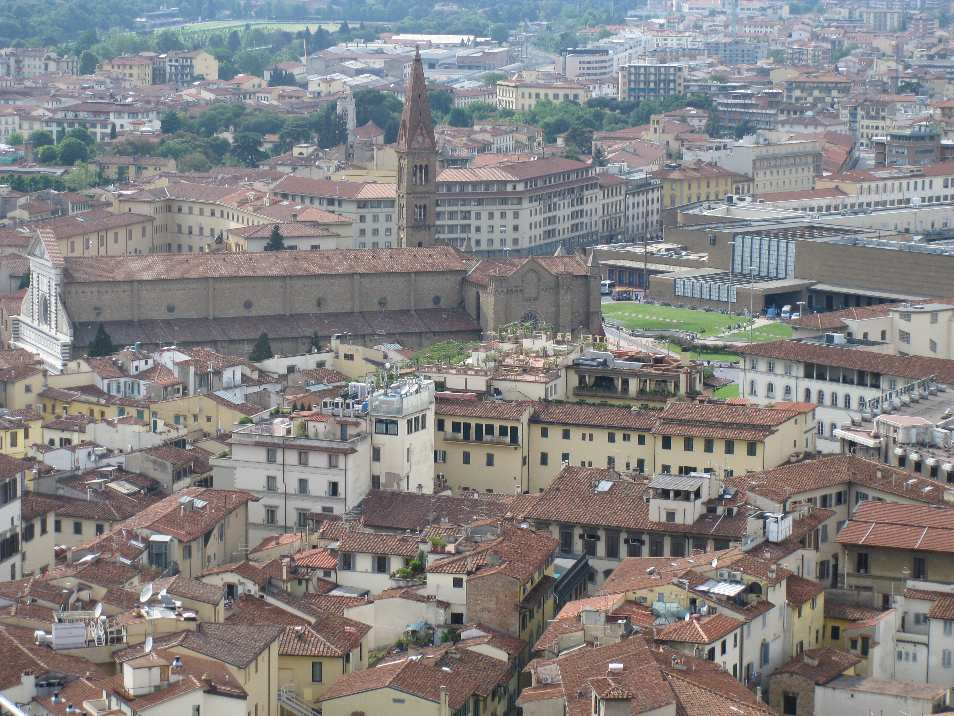 View from Giotto's Bell Tower הנוף הנשקף ממגדל הפעמונים של הקתדרלה של פירנצה